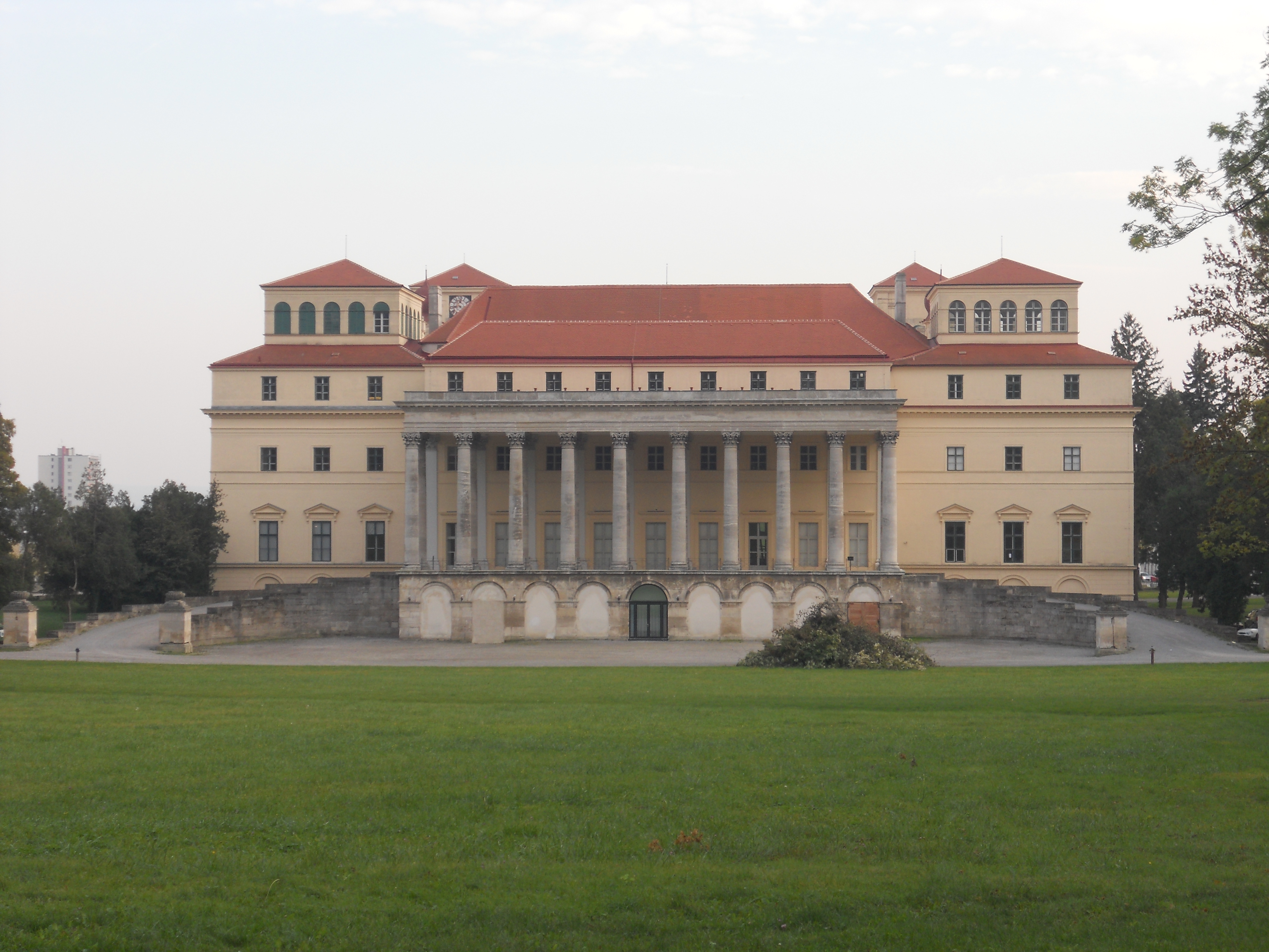 Schloss Esterházy in Eisenstadt, Ansicht vom Schlosspark